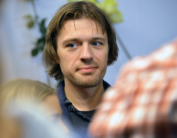 Миндаугас Карбаускис на фестивале Золотая маска 2012 - «Лучшие спектакли в городах России»